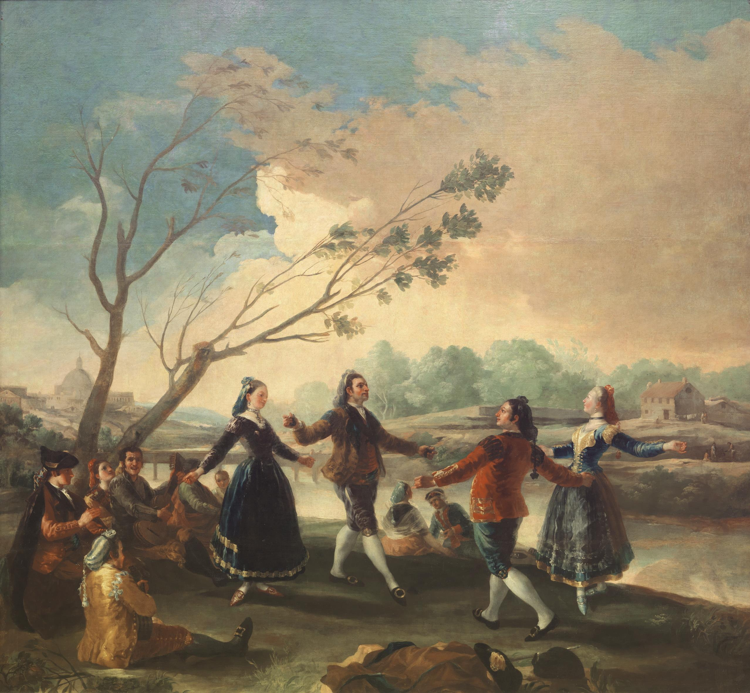 Tema: Paisaje; música y danza; escena de costumbres